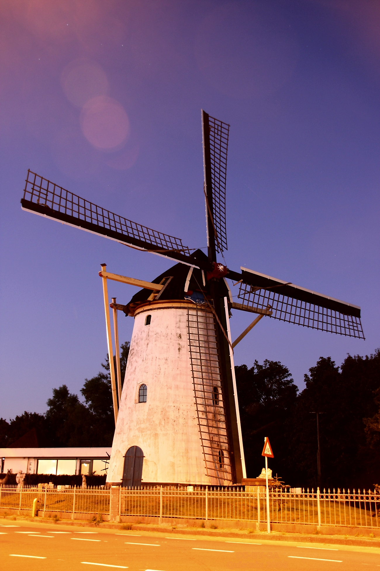 Hellevoetsluis: molen Zeezicht bij nacht